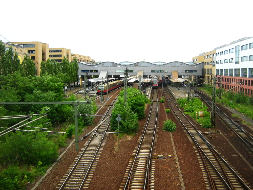 Potsdam Hauptbahnhof, Blick von einer Brücke auf die Gleisanlagen und die sog. Spange, den Verbindungstrakt zwischen den beiden Gebäudeteilen des Komplexes, mit den Zugängen zu den Bahnsteigen.